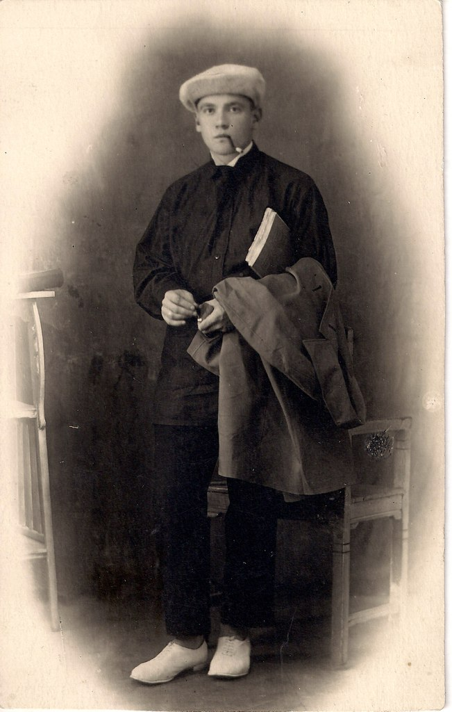 Беларуская (тарашкевіца): Максім Лужанін